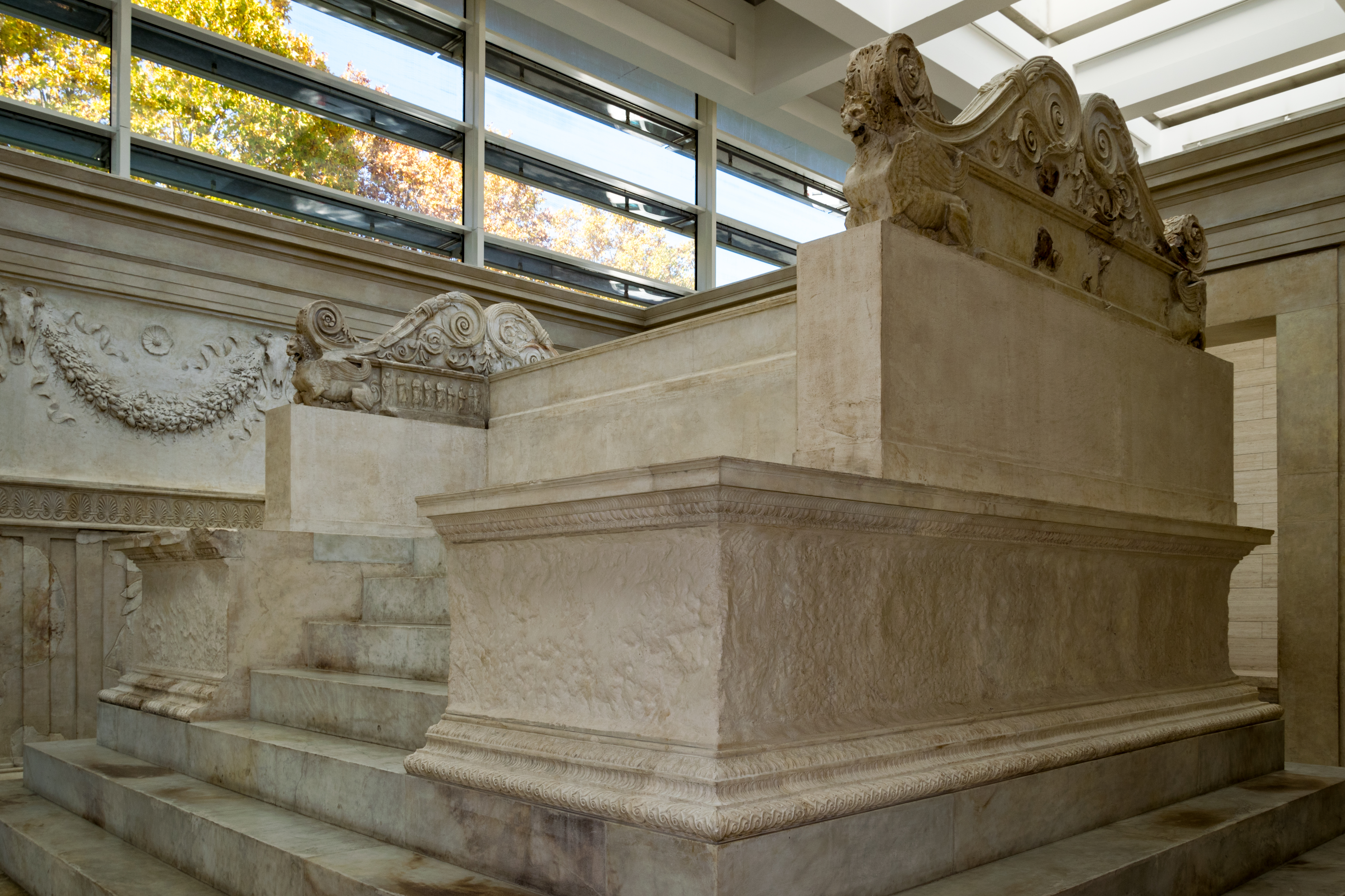 Der Altar in der Ara Pacis